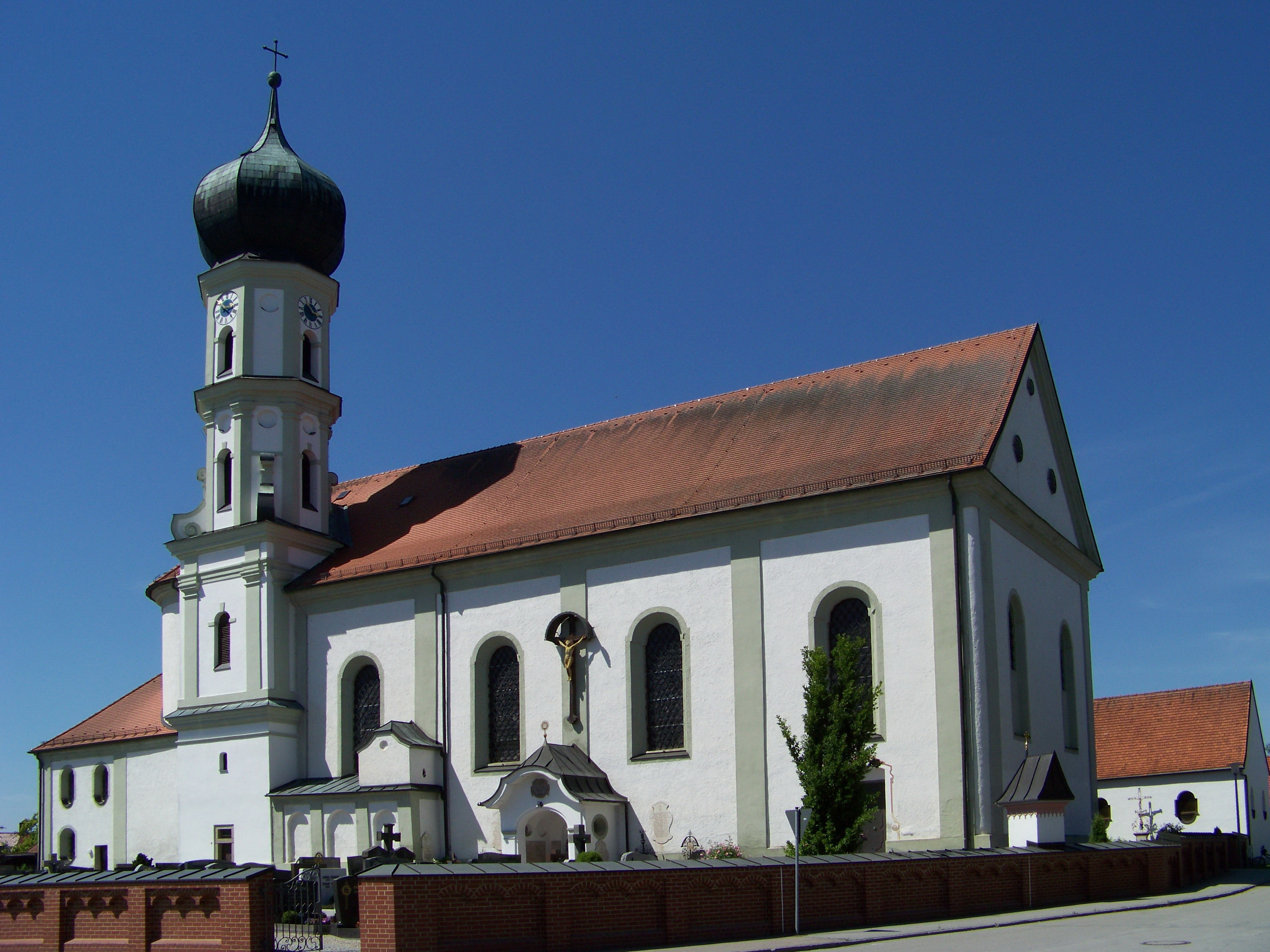 Wallersdorf, Altenbuch. Katholische Pfarrkirche St. Rupert, Saalbau mit Südturm, Neubau 1765; mit Ausstattung.